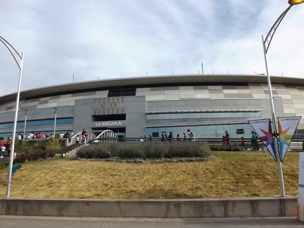 Espacio Julio Le Parc, en Guaymallén (Mendoza, Argentina).